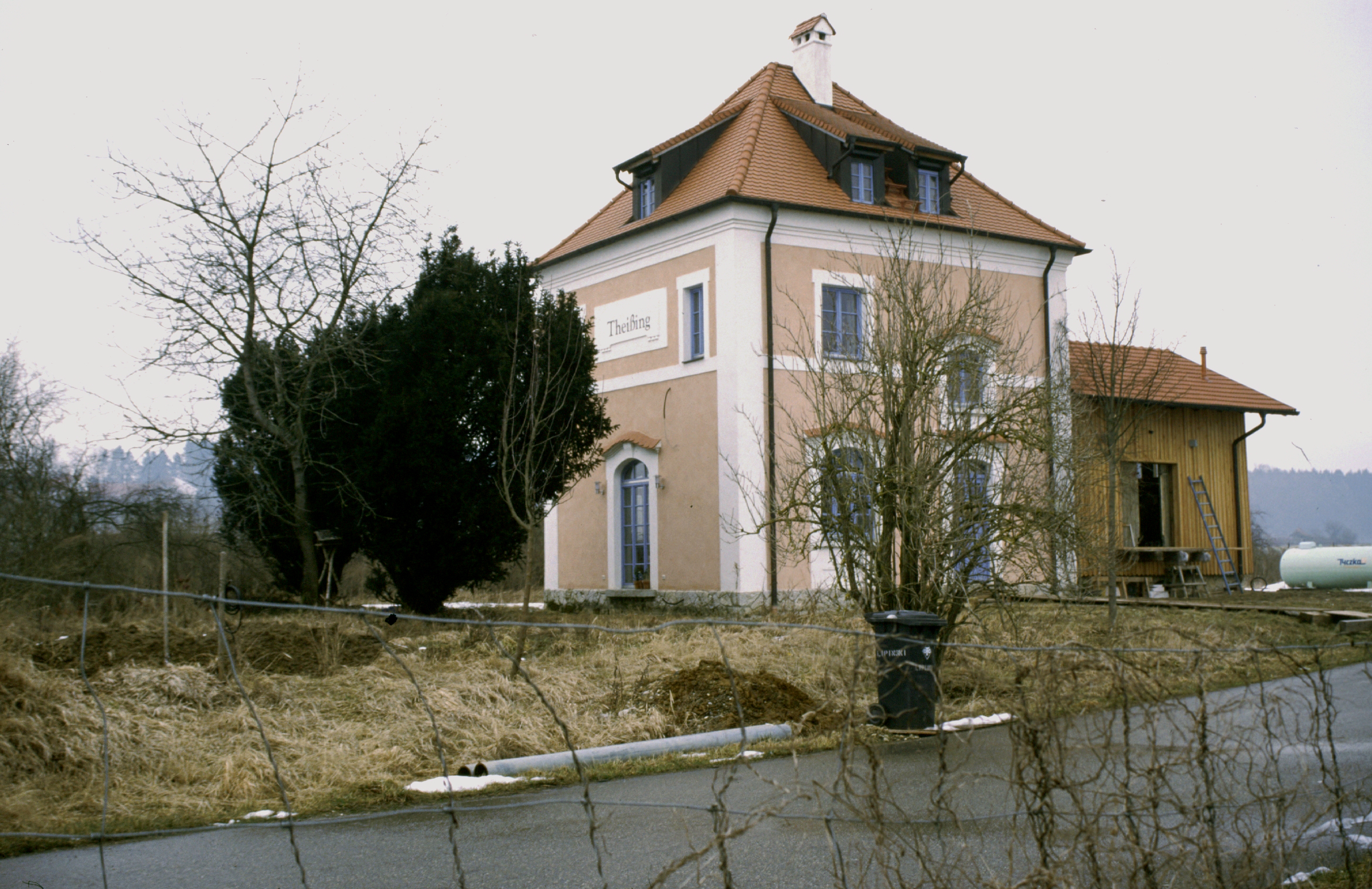 Die Strecke Ingolstadt - Altmannstein im Jahr 2003 kurze Zeit vor dem Abbau: Der ehemalige Bahnhof "Theißing" ca. 1 km nordwesstlich von Tholbath.